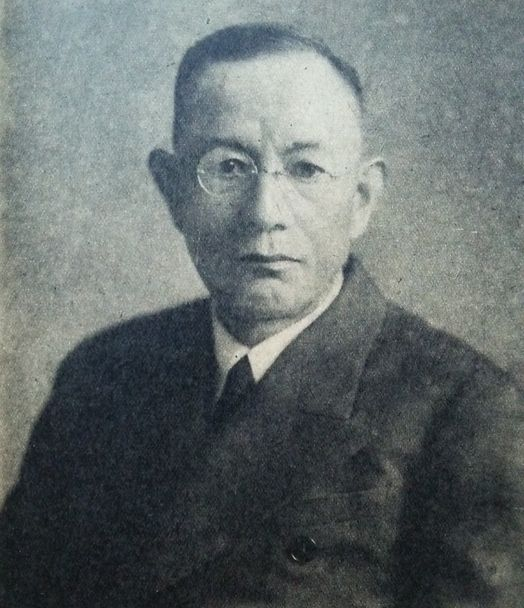 信夫淳平